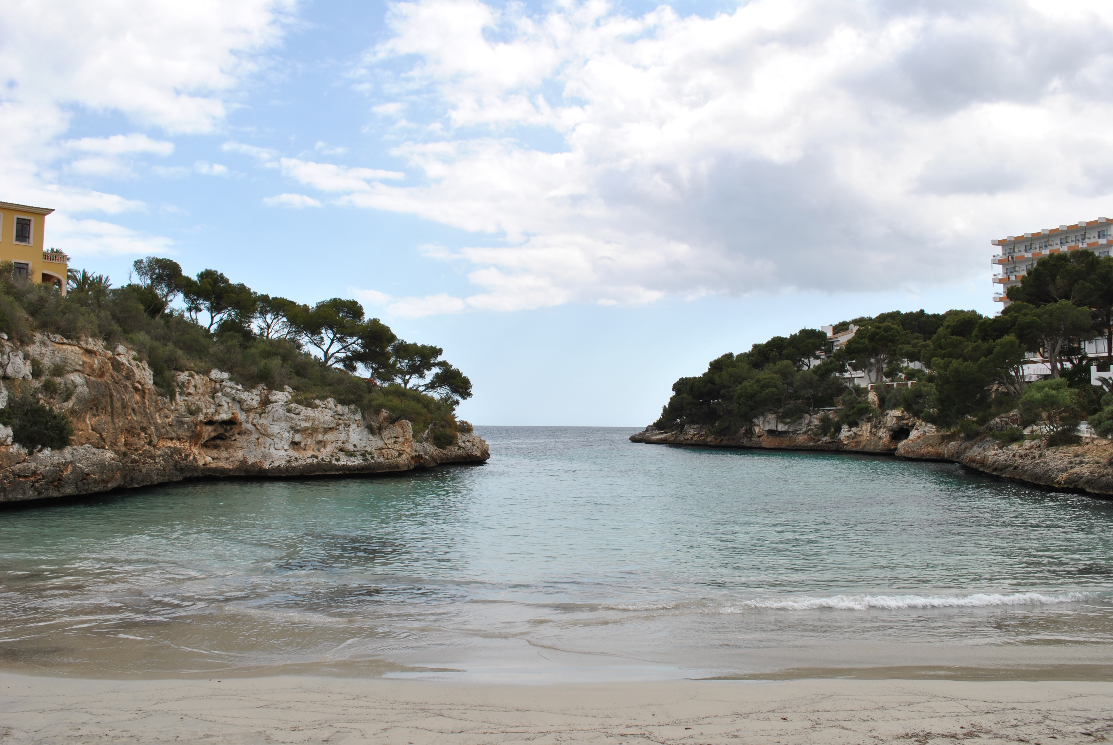 Cala Ferrera (Felanitx) This is a a photo of a beach in the Balearic Islands, Spain, with id: PL-IB-20008